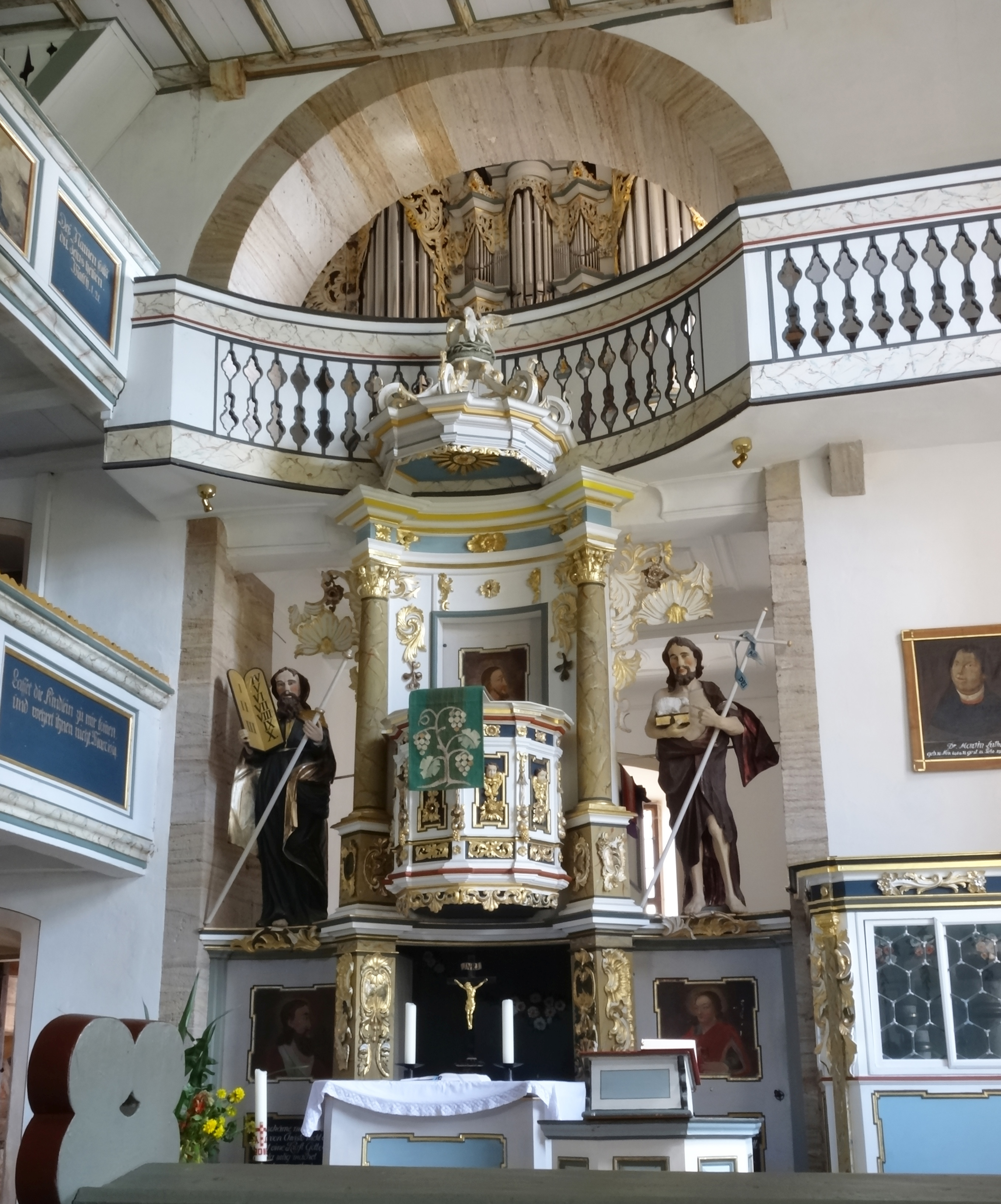 Kanzelaltar und Orgel der Dorfkirche Wohlmuthausen